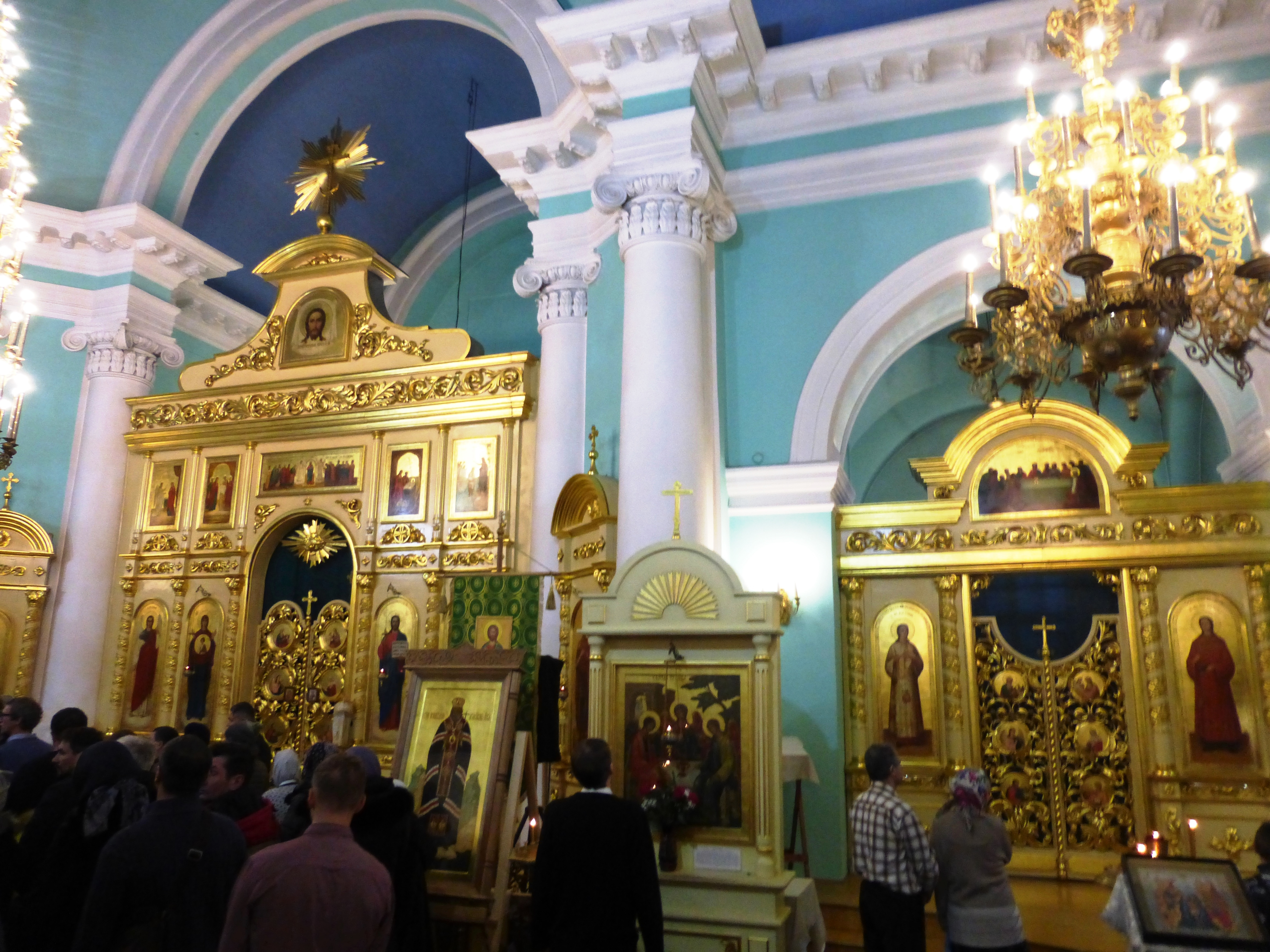 Собор Александра Невского в Петрозаводске.